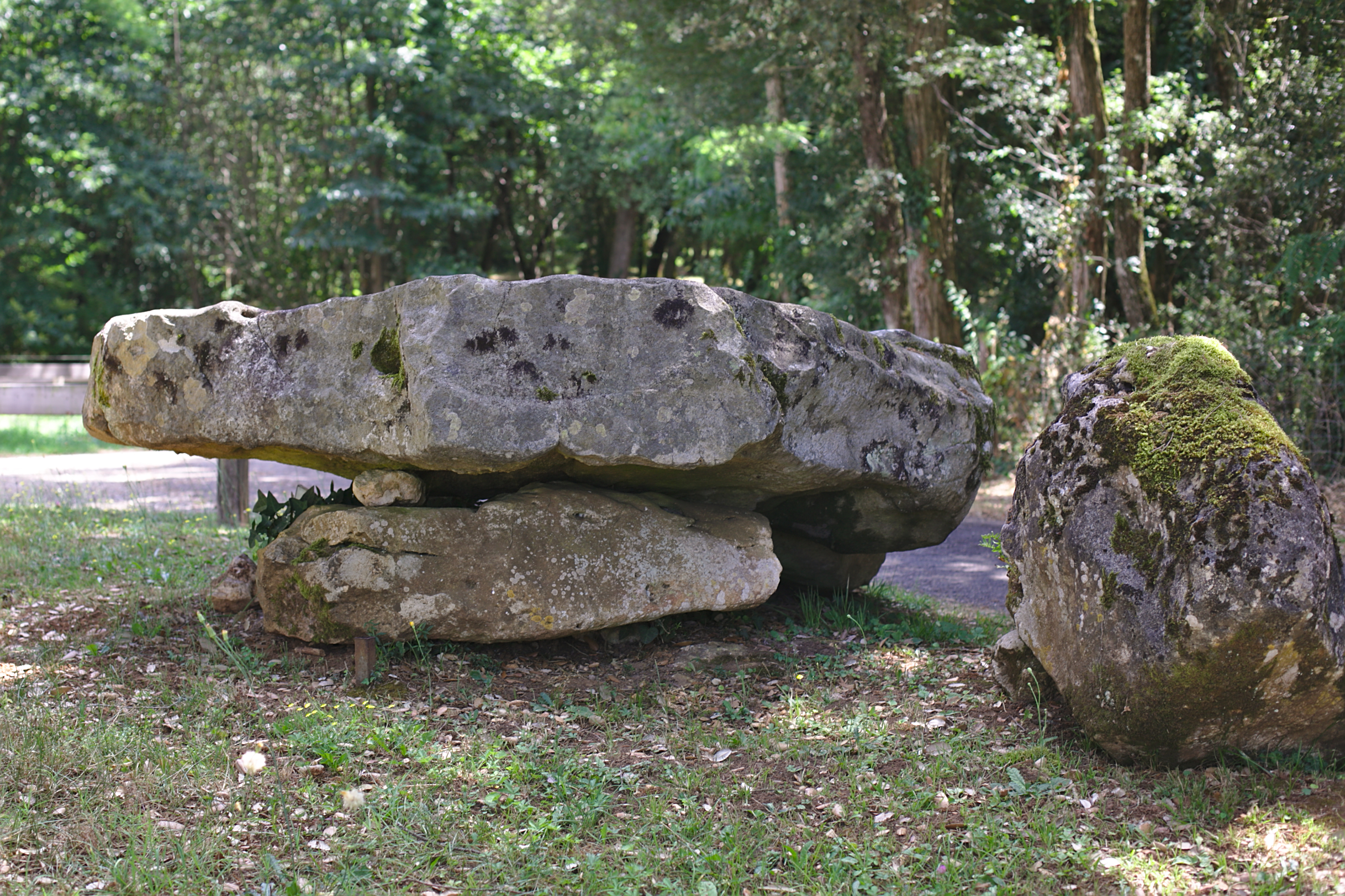 Dolmen de Giverzac à Domme : face ouest. .